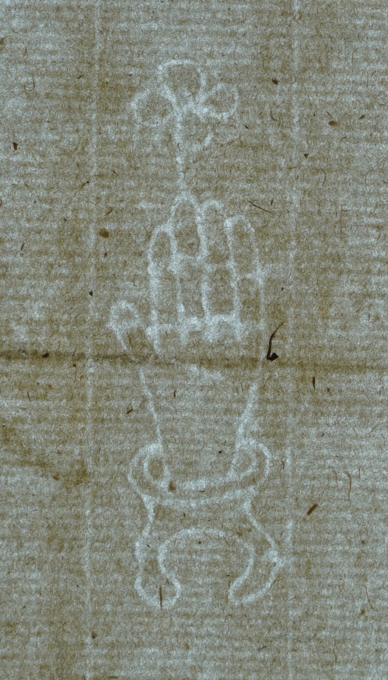 Acte notarié de la famille Angenoust.